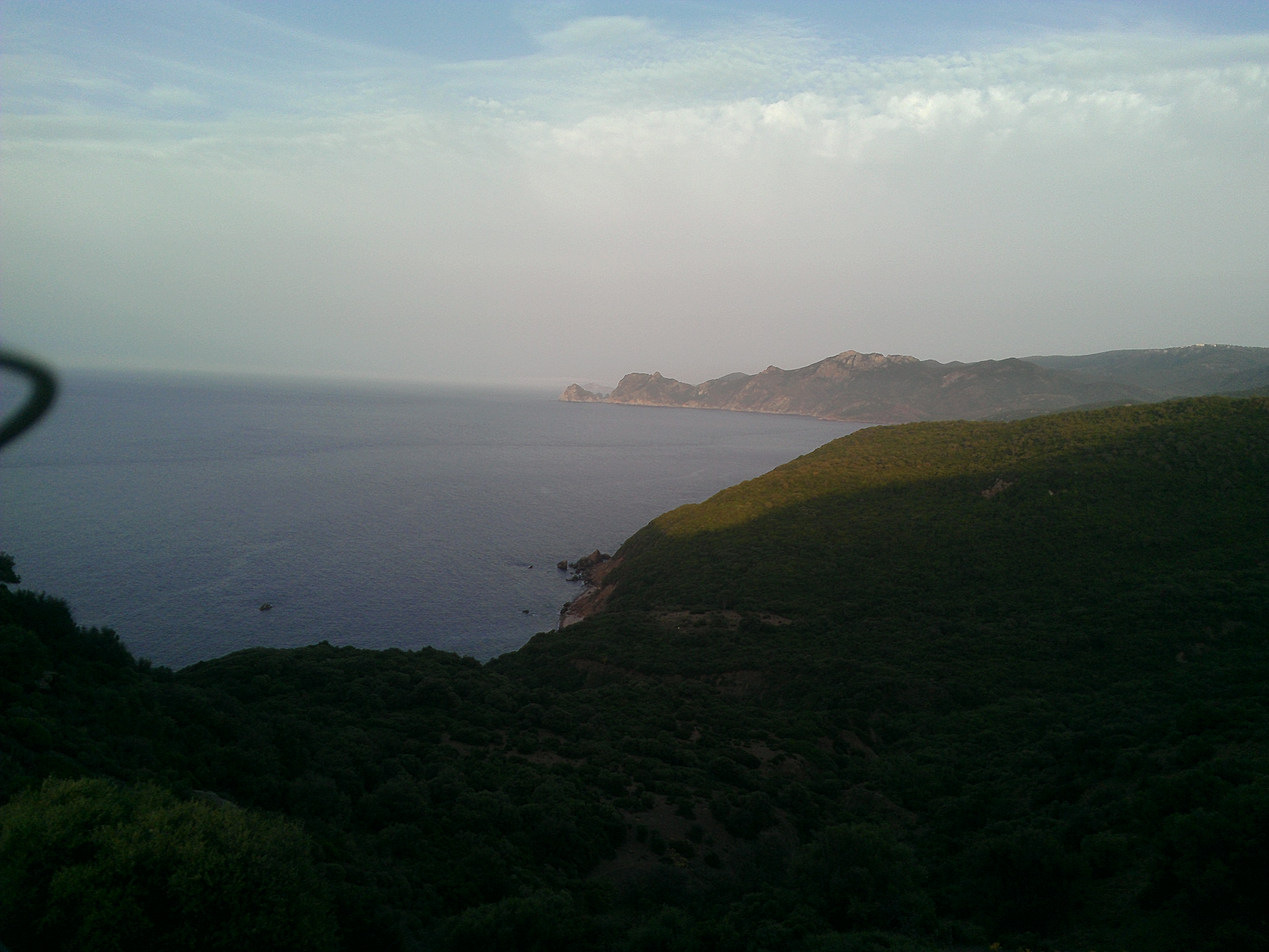 aine barber 2 annaba algeria Latitude: 36°59'28.68" Longitude: 7°33'23.04"